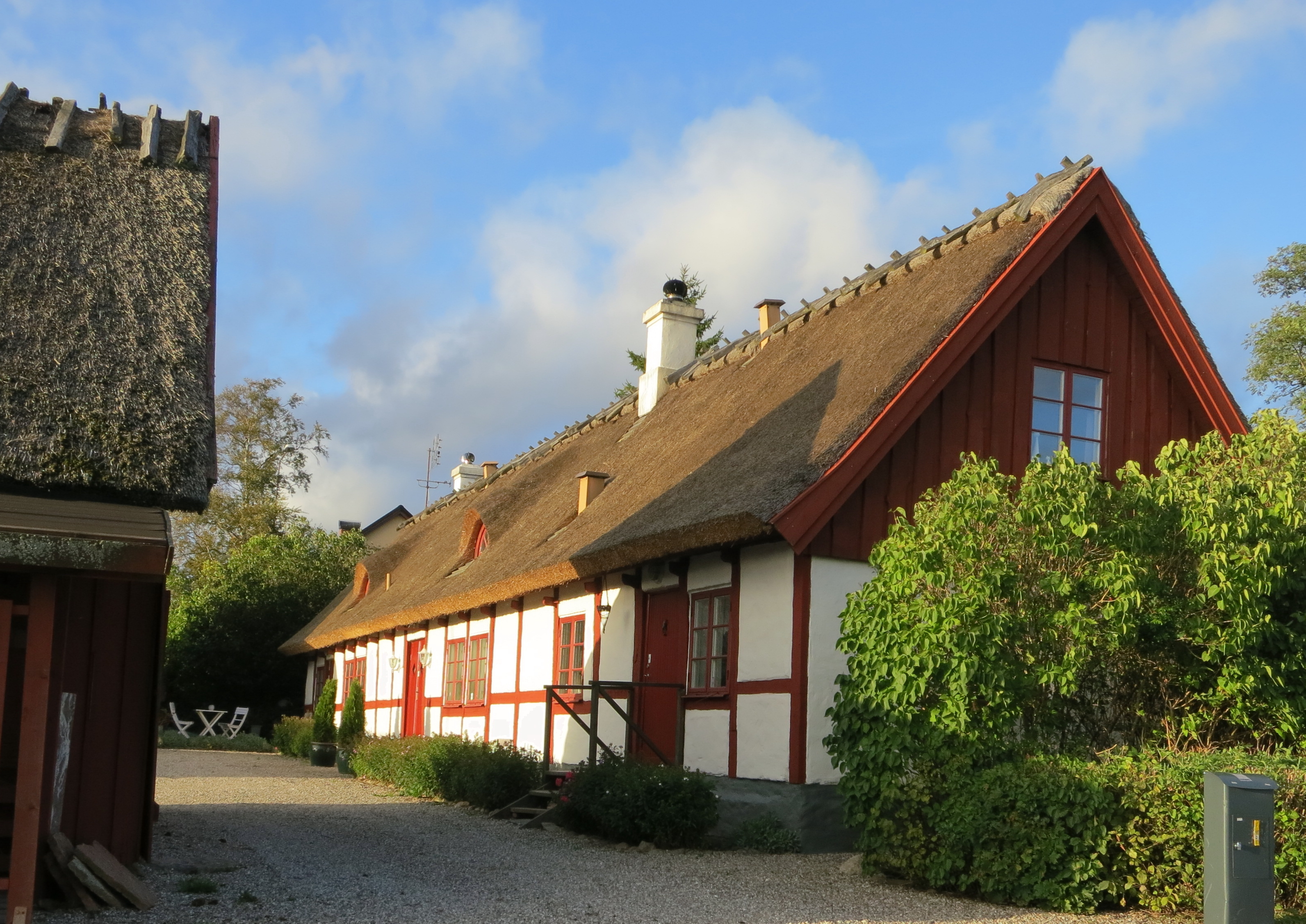 Gamlegård i Dagstorp